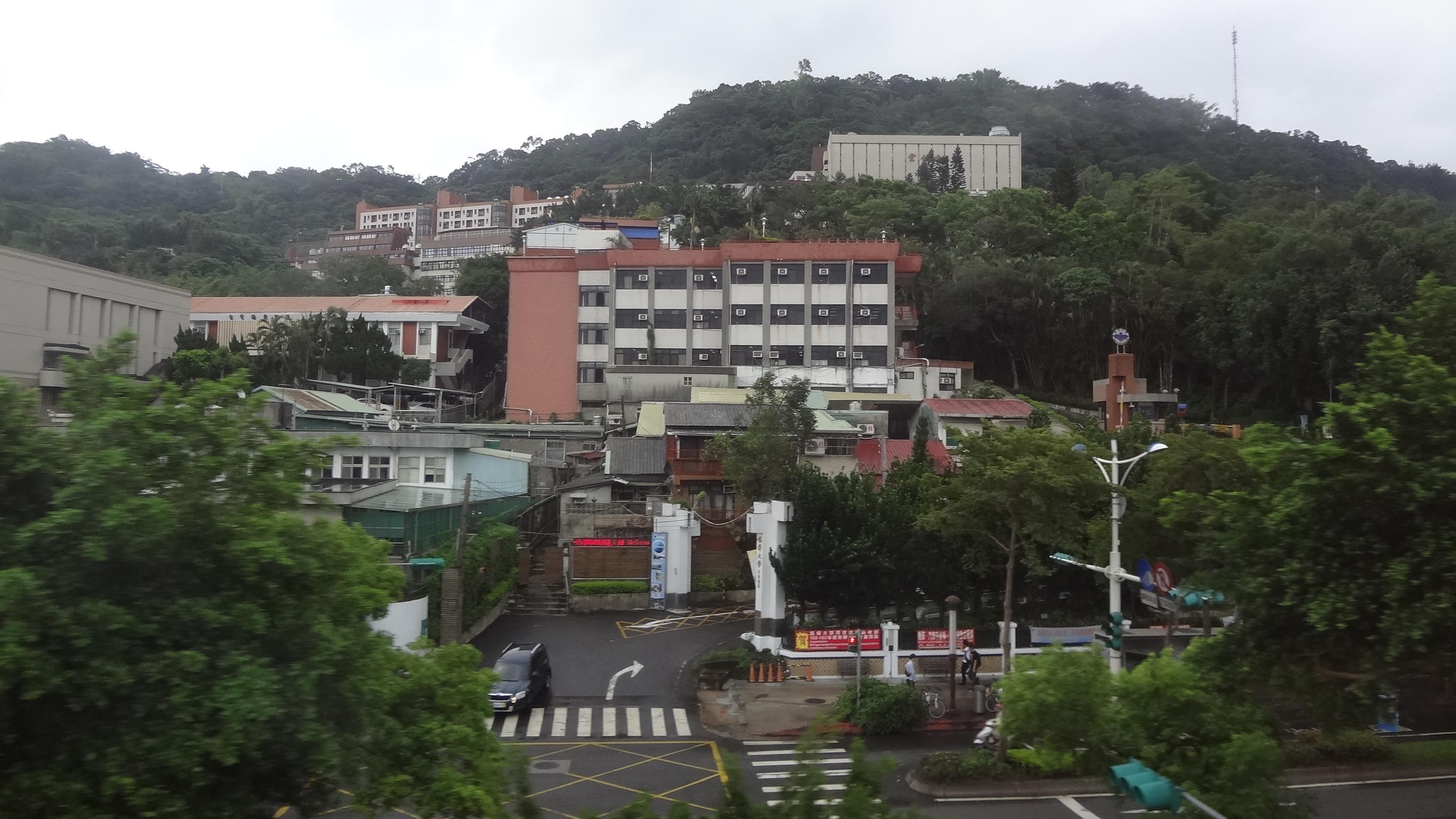 從台北捷運列車遠望銘傳大學台北校區。